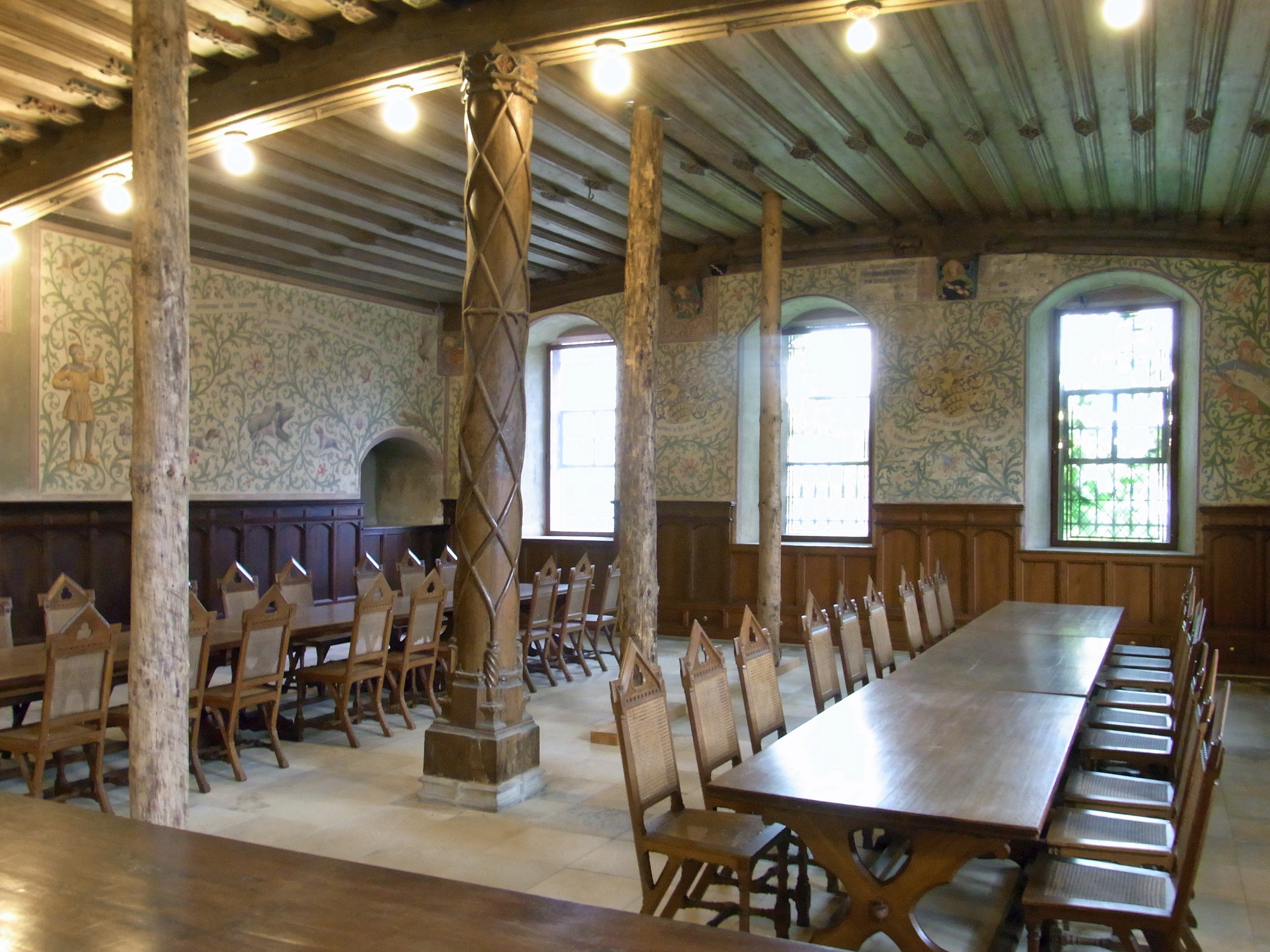 Kloster Bebenhausen: Winterrefektorium